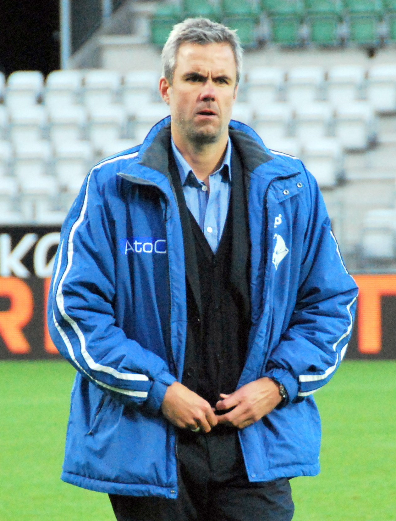 Cheftræner og tidligere fodboldspiller Michael Hemmingsen fra Randers FC. Her under en 1. divisionskamp mod Viborg FF på Viborg Stadion.